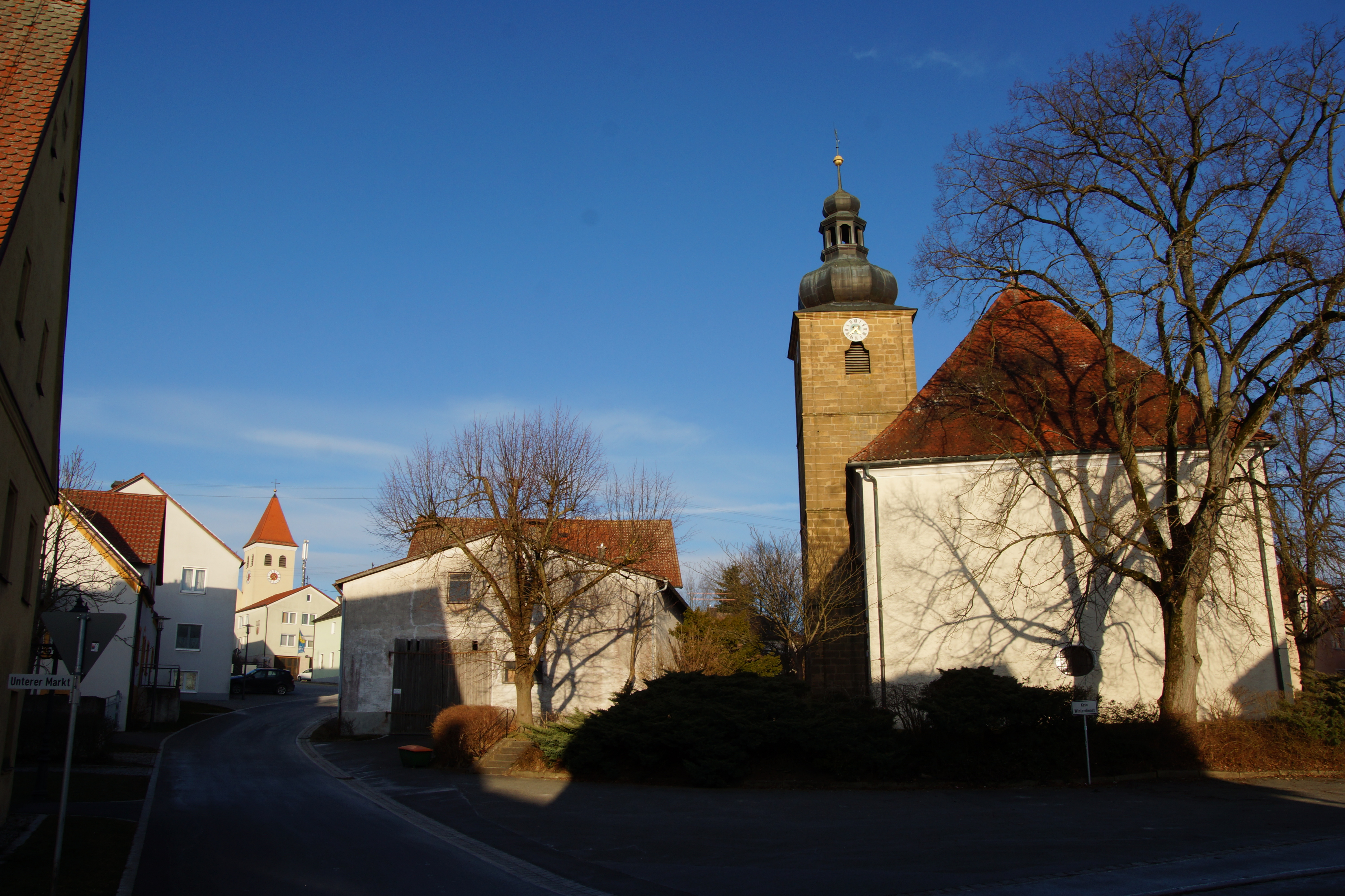 Der ehemalige Markt Kaltenbrunn bei Weiherhammer in der Oberpfalz